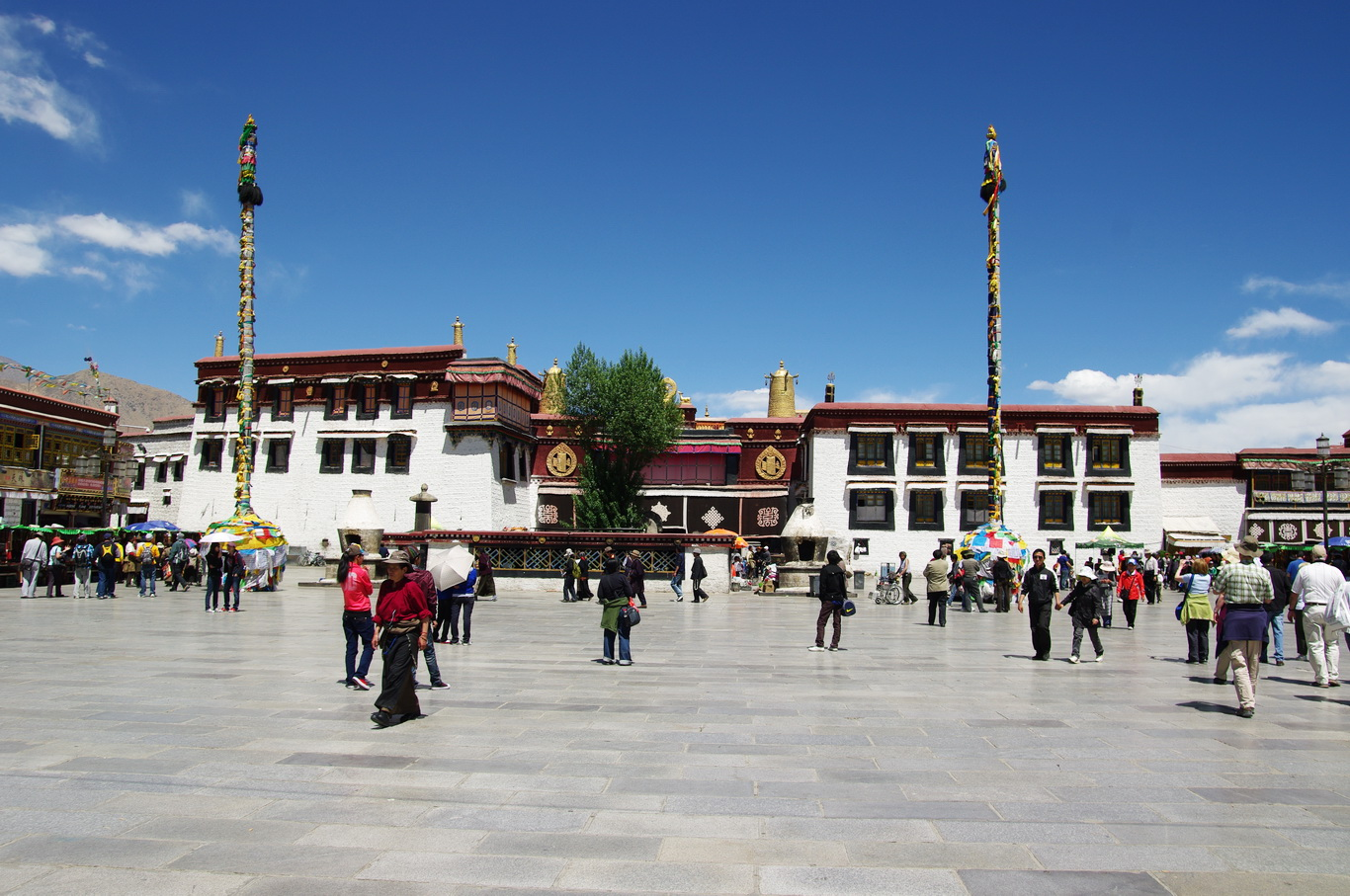 Eingangsbereich Jokhang-Tempel